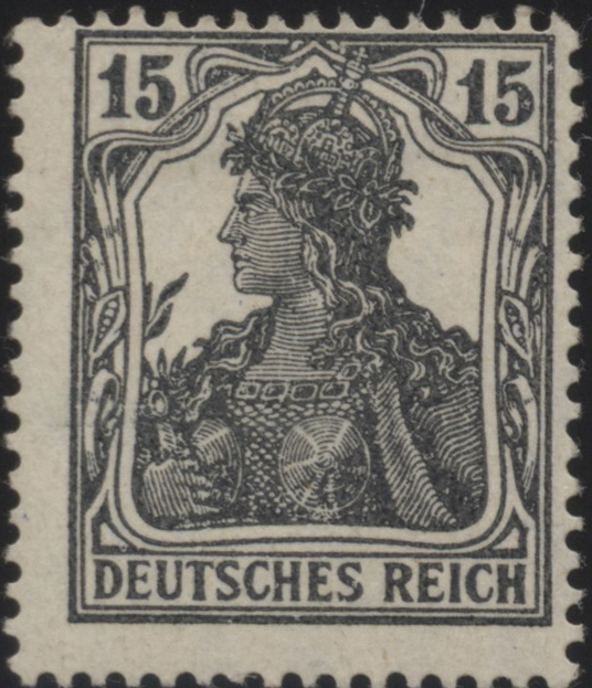 Britische "Germania-Fälschung" 15 Pf, 1918